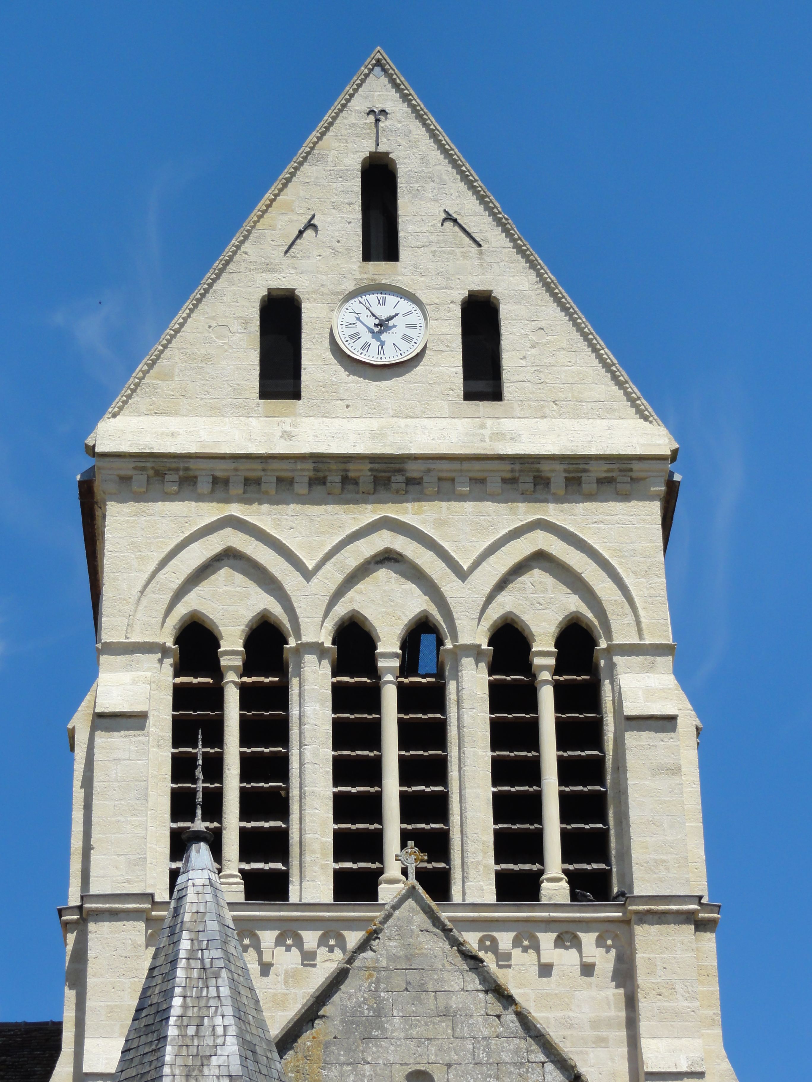 Église de la Sainte-Trinité de Choisy-au-Bac (voir titre).